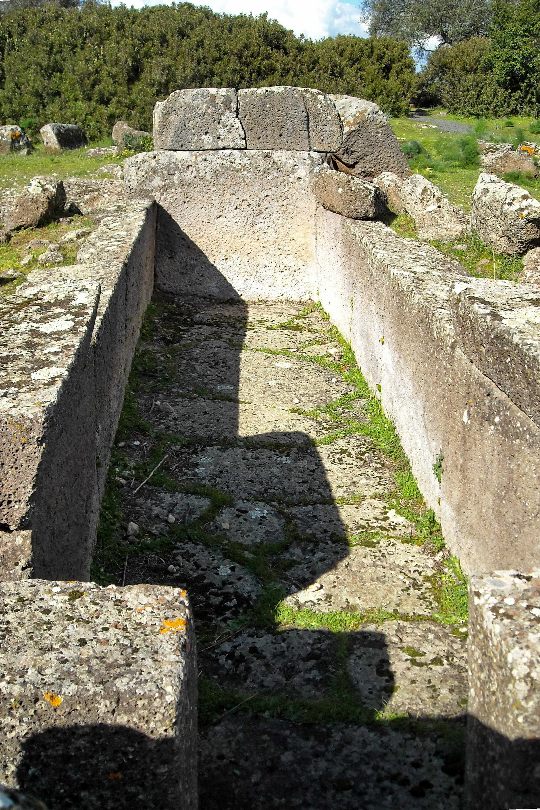 Nuraghe e tomba di gigante n.2 di Iloi - MIBAC This is a photo of a monument which is part of cultural heritage of Italy.